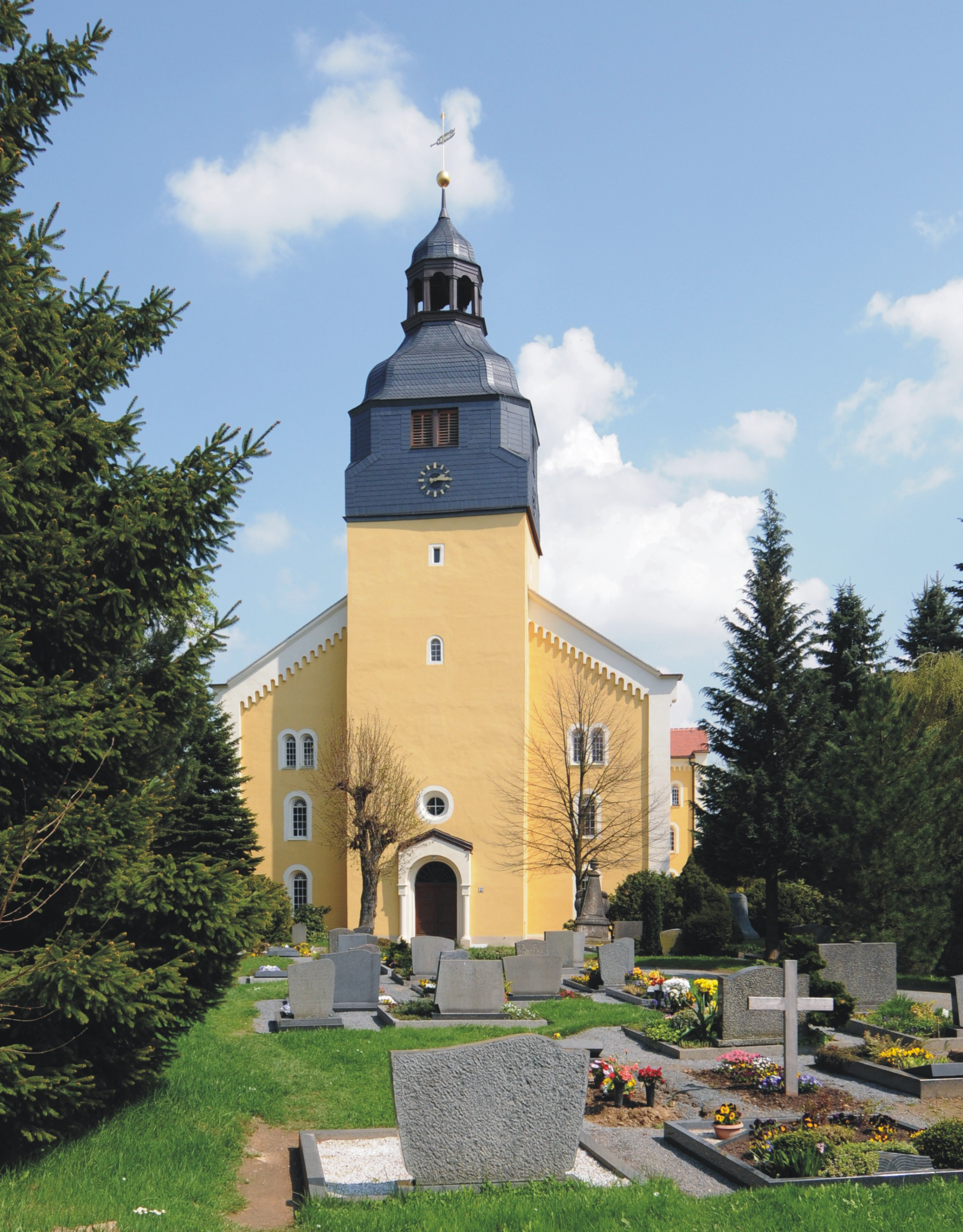 Ev. Pfarrkirche in Steinigtwolmsdorf (Sachsen, Deutschland)